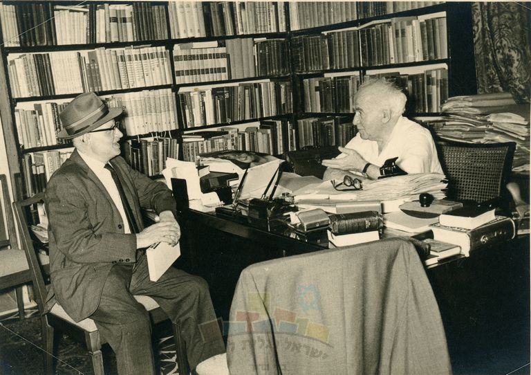 משה פראגר בבית ראש הממשלה דוד בן גוריון עם קבלת אות ההגנה ברחוב קרן קיימת בתל אביב.